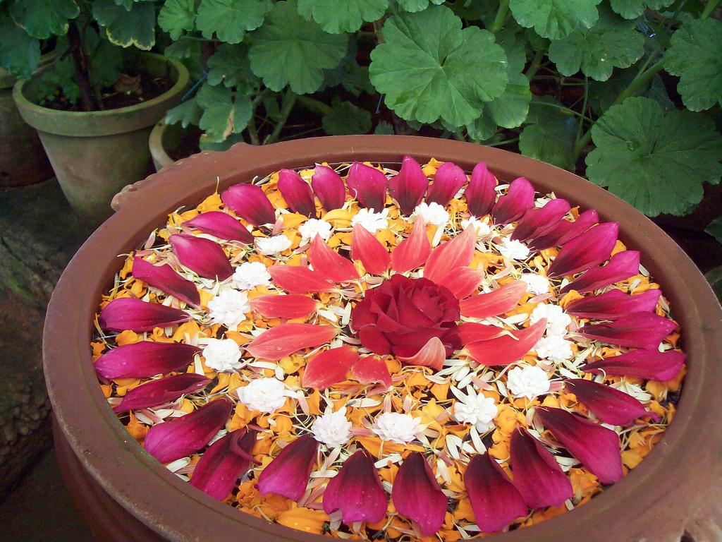 Rangoli on water